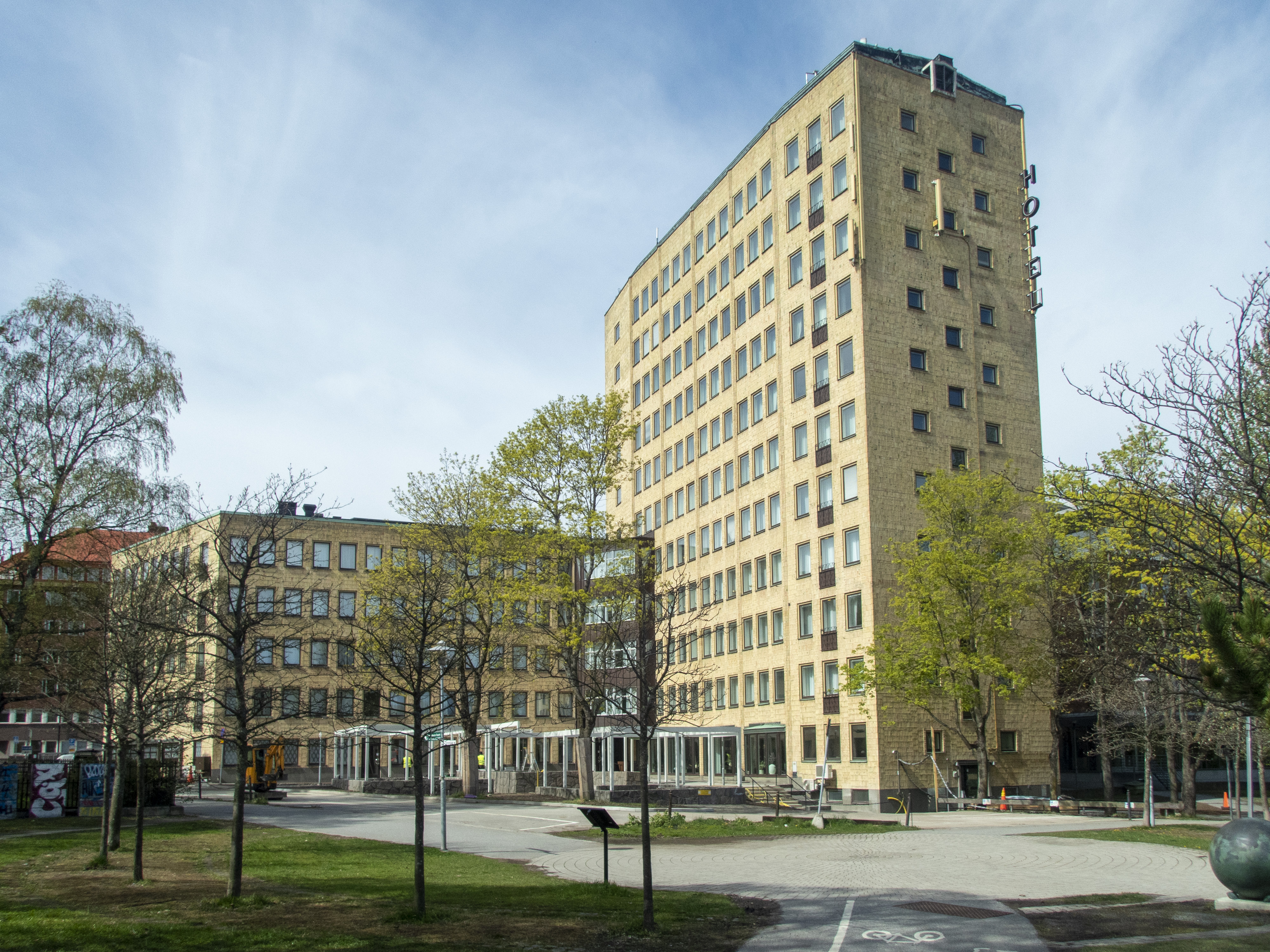 Hagahuset, Solna. Uppfört 1954–1957 för Stockholms läns landsting. Arkitekt Stig Annerfelt